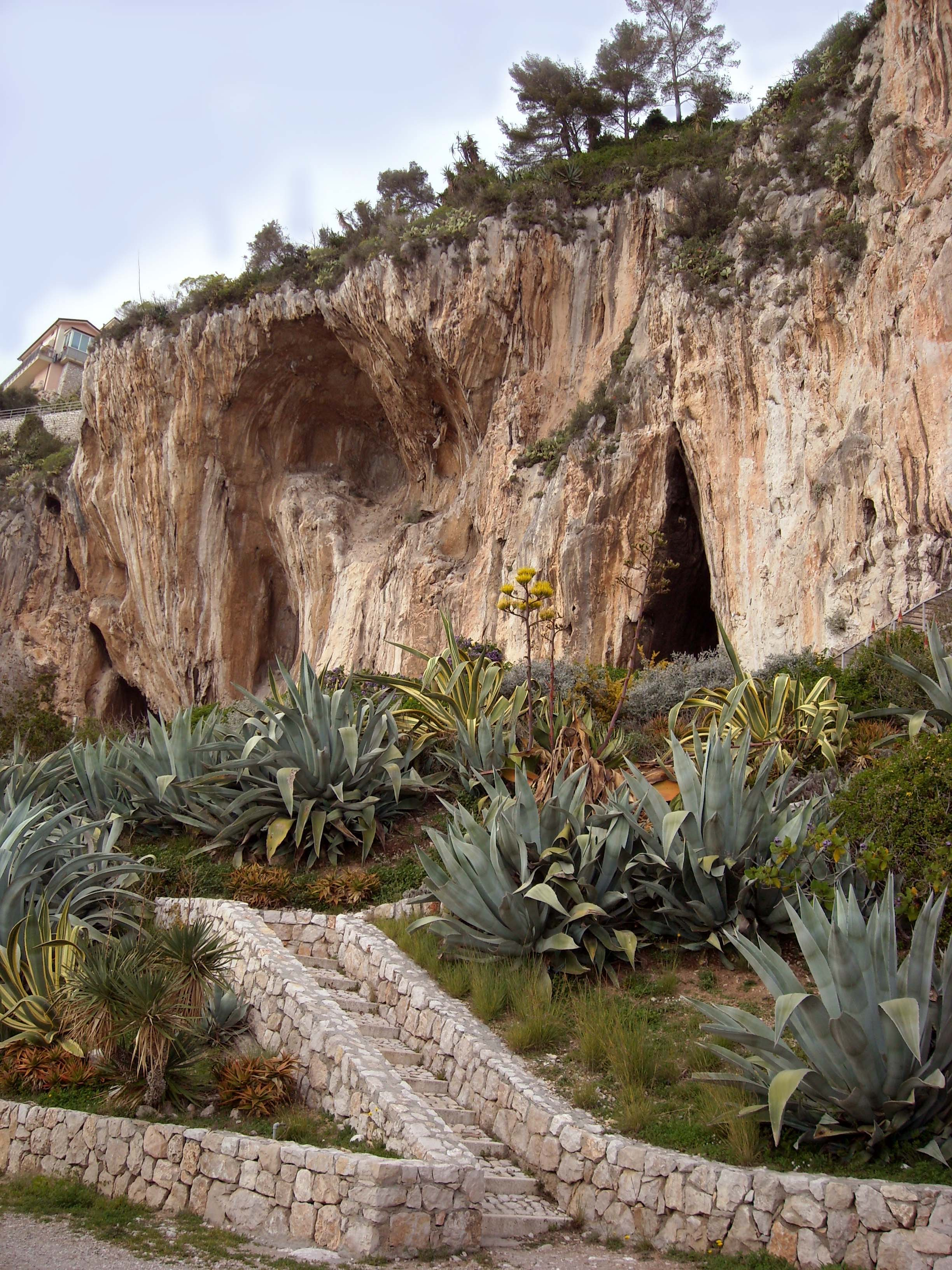 Le caverne dei Balzi Rossi, da occidente ad oriente: Grotta dei Fanciulli, Grotta di Florestano e Grotta di Caviglione a Ventimiglia in Liguria, Italia. D'ouest en est, les cavernes des Balzi Rossi: Grotte des Demoiselles, grotte de Florestan et grotte de Caviglione à Vintimille en Ligurie, Italie.